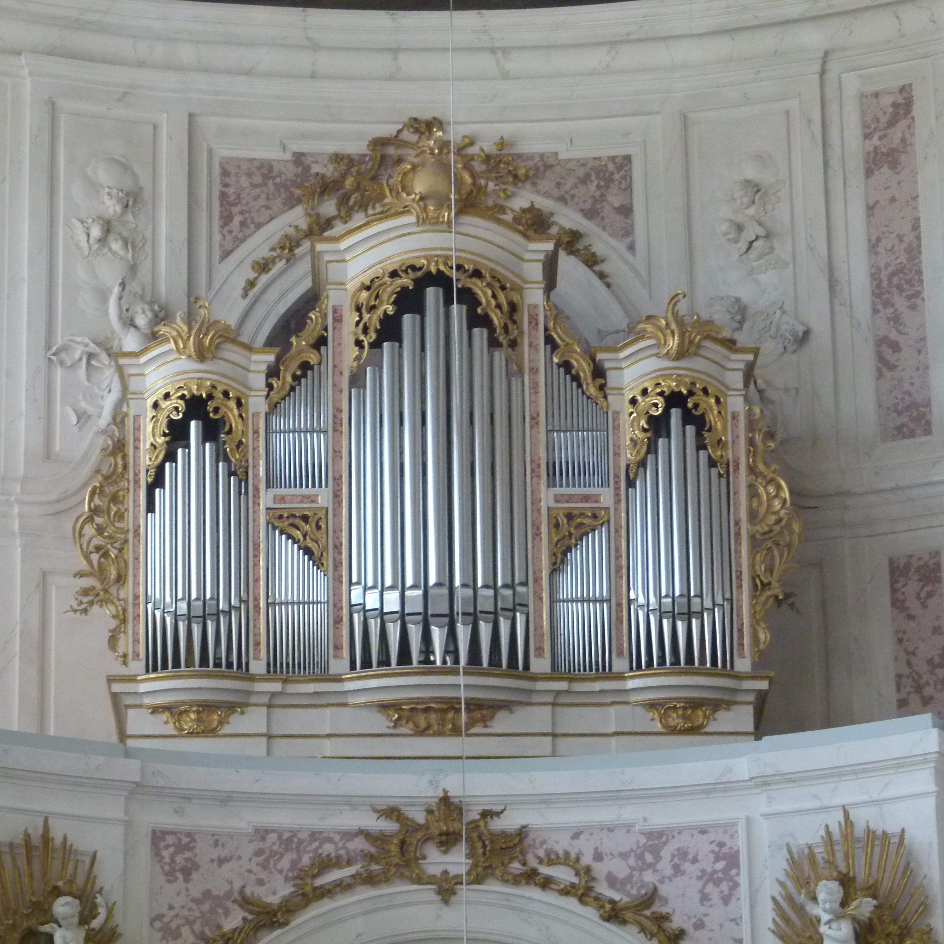 Schloss Hubertusburg, Wermsdorf, Sachsen